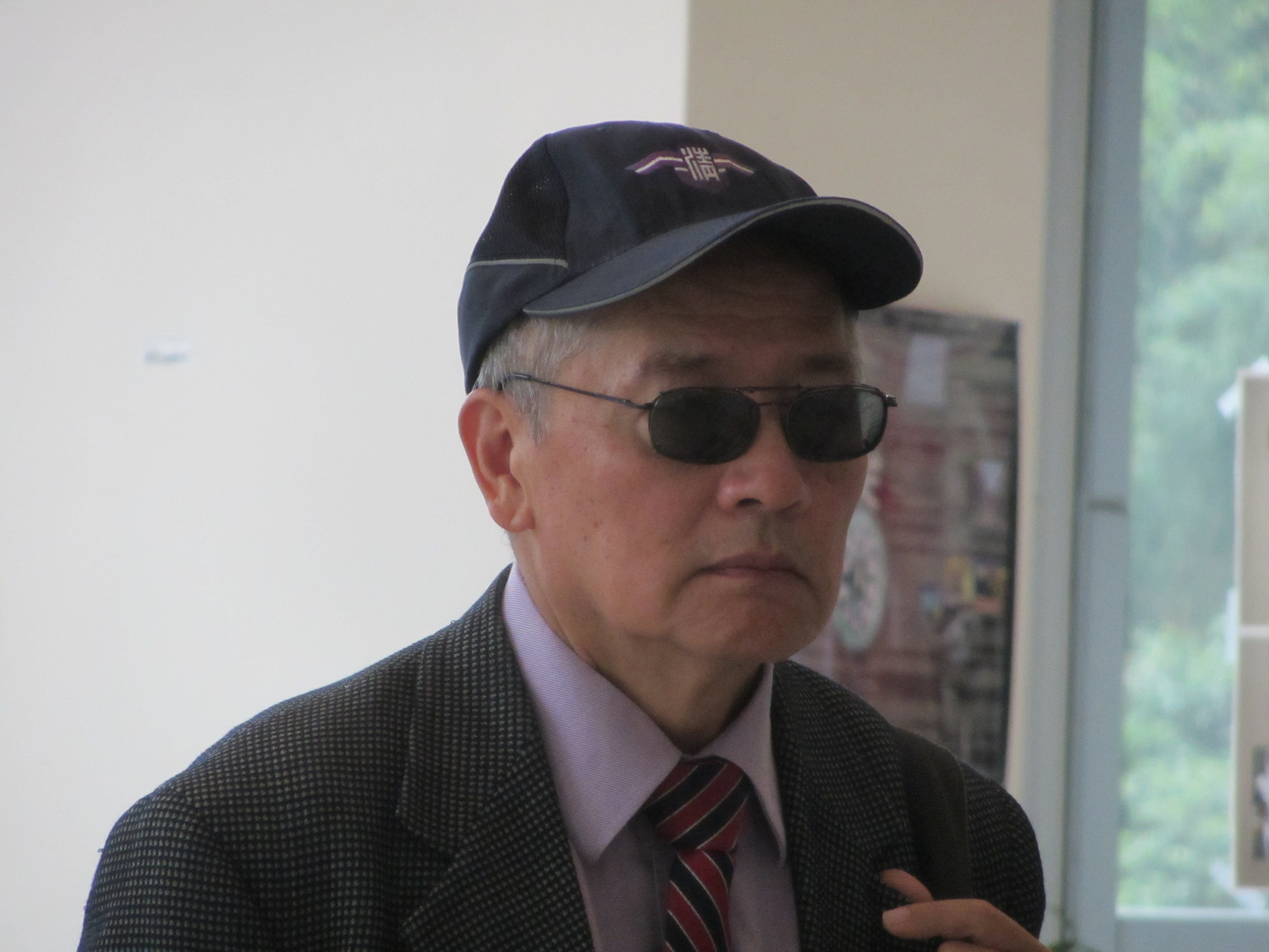 中央研究院院士，前國立清華大學校長徐遐生。